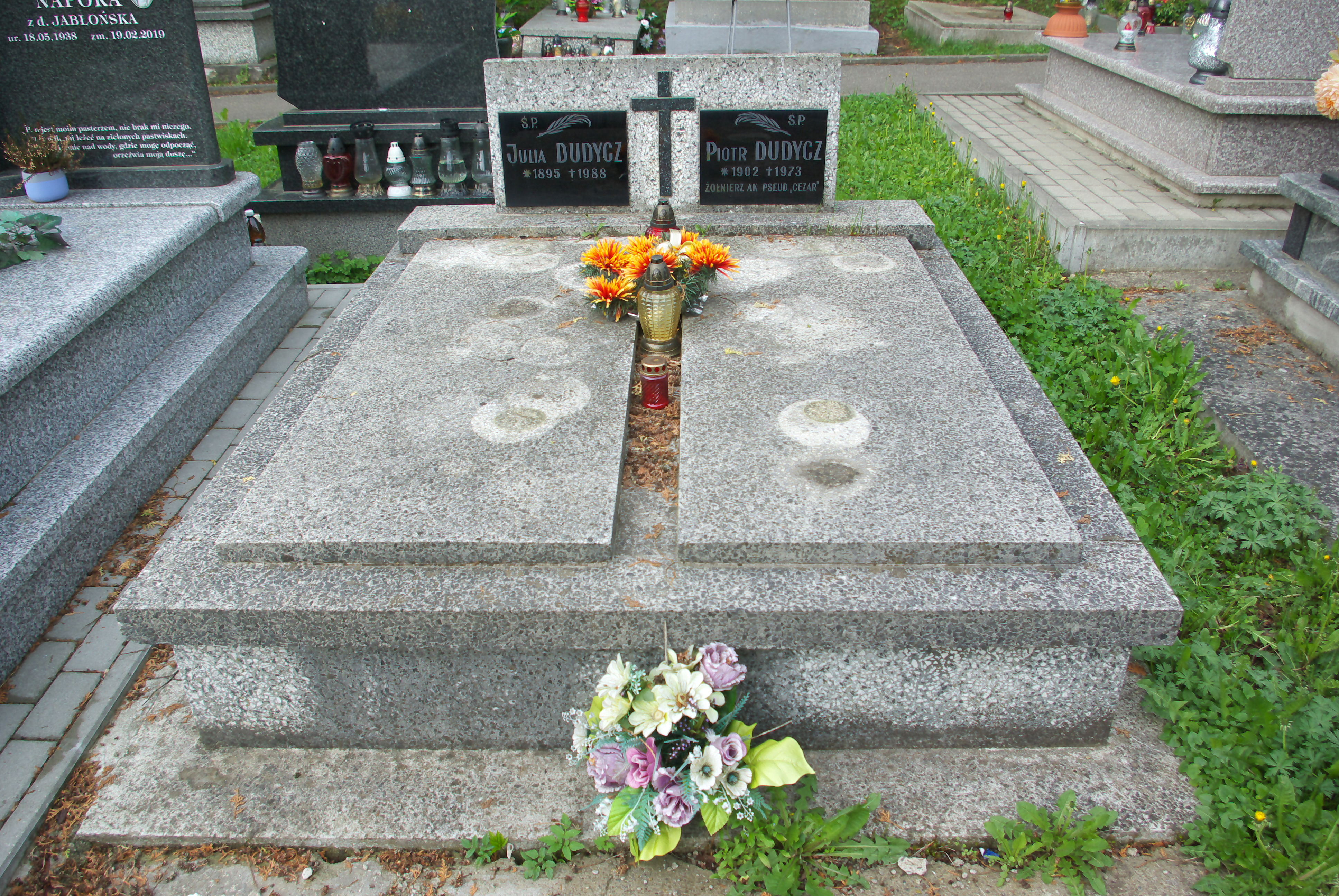 Grobowiec Julia i Piotra Dudyczów na Cmentarzu Centralnym w Sanoku